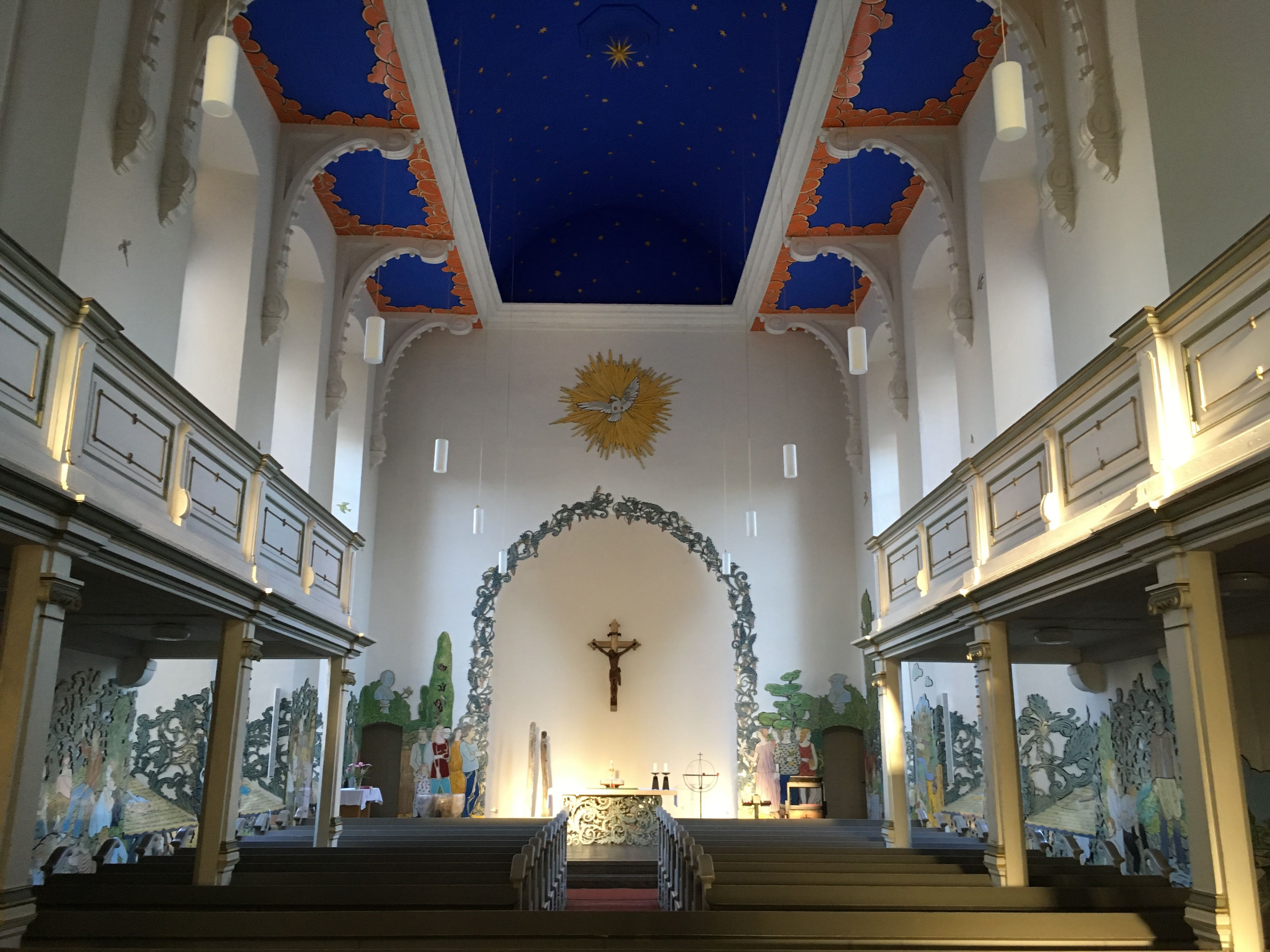 Kirchenraum